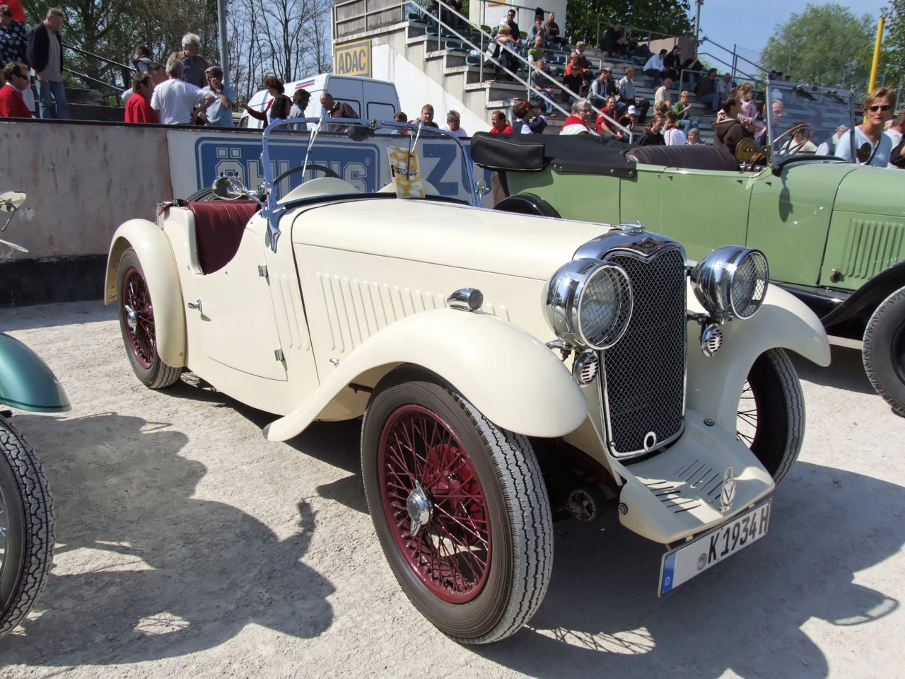 Quelle: selbst fotografiert, 04/2007 Fotograf: Späth Chr.